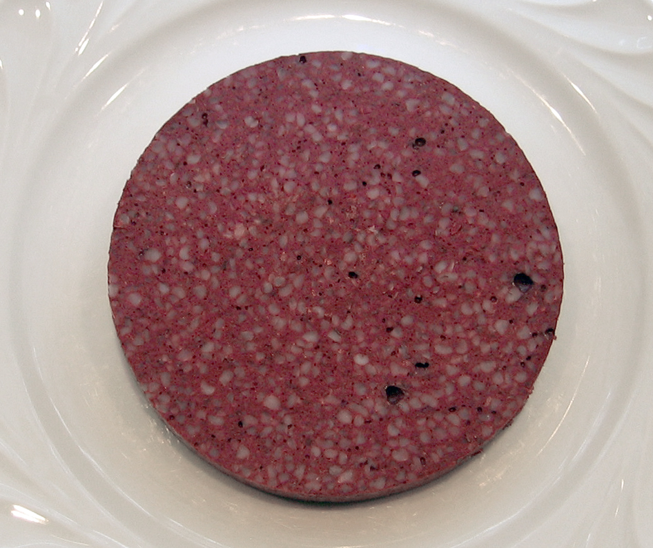 Eine frisch geschnittene Scheibe Panhas (Erzeugnis einer Dortmunder Fleischerei) auf einem Speiseteller